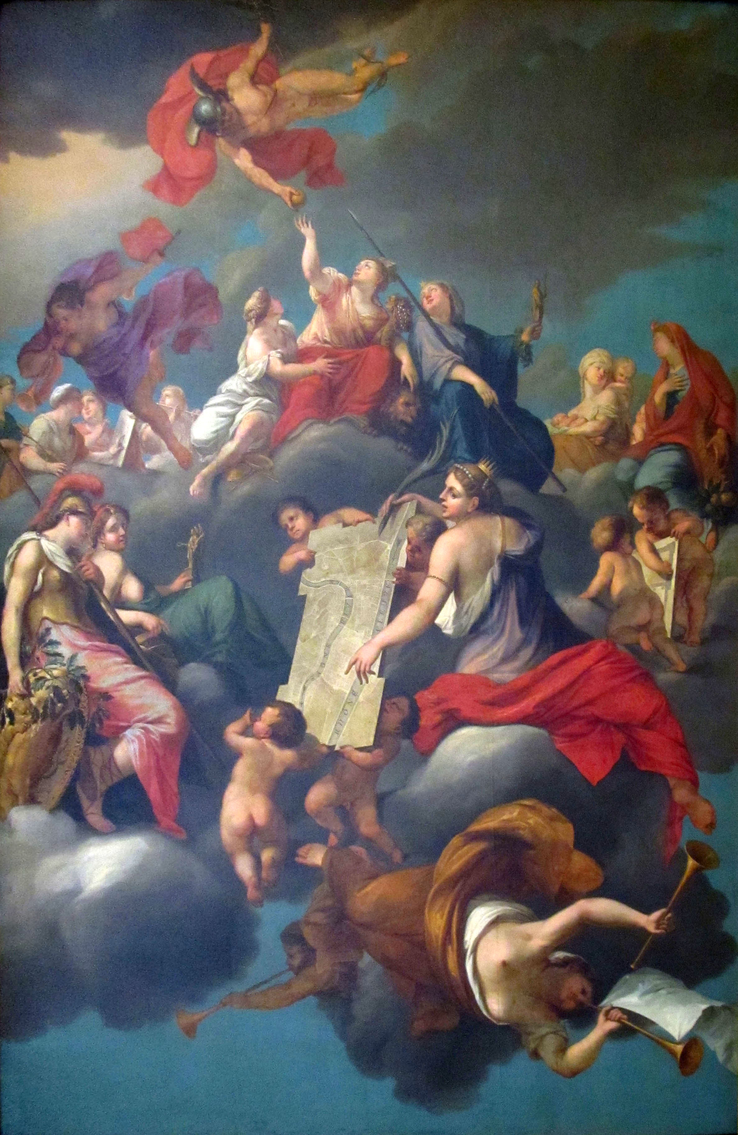 Toile réalisée par Thomas Blanchet en 1660 et visible au plafond du Salon du Consulat de l'Hôtel de Ville.